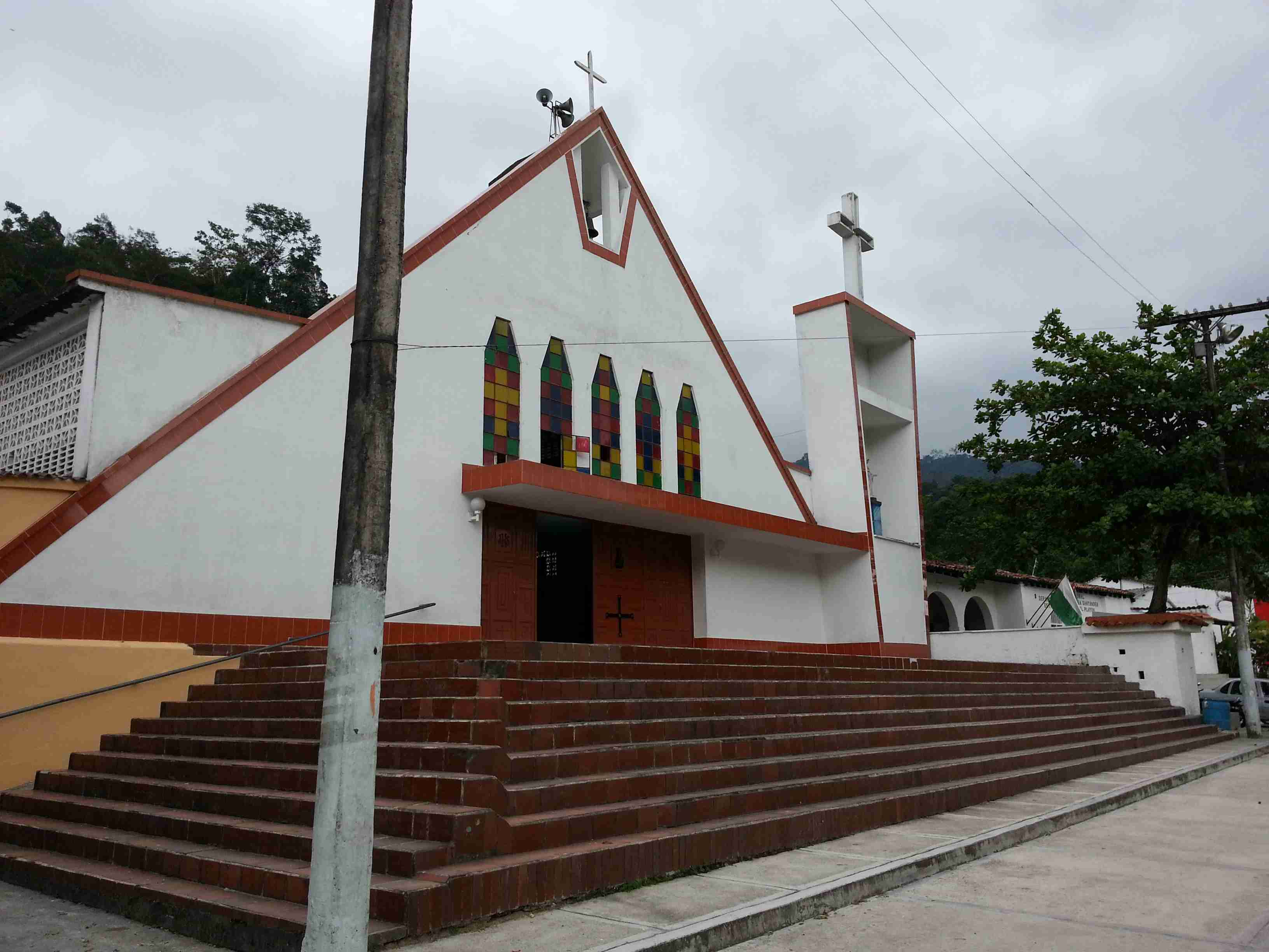 Traicionan iglesia de El Playon en forma de pirámide donde los fieles se reúnen a alabar a Dios